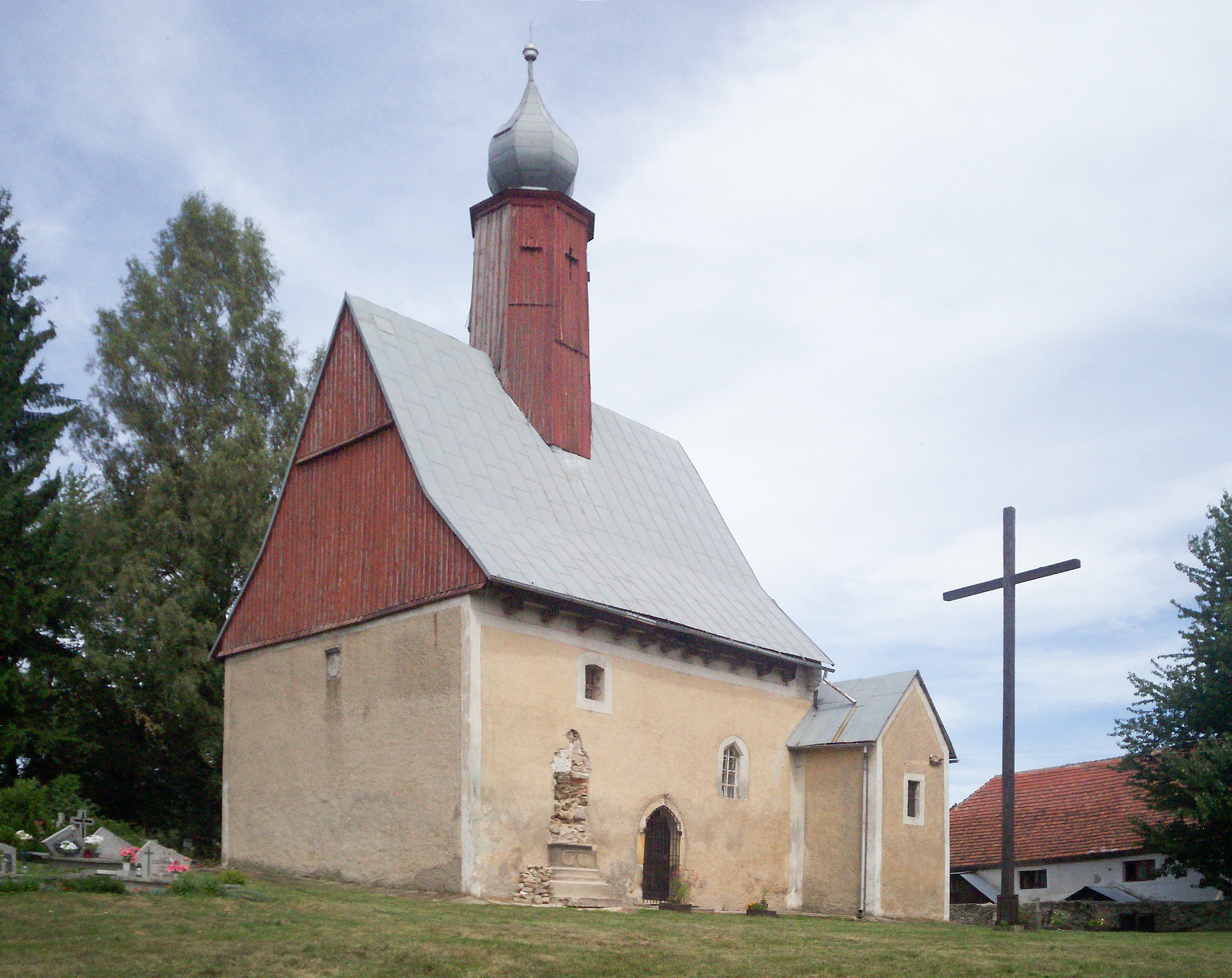 Radomice – kościół pw. św. Jakuba Apostoła i św. Katarzyny.